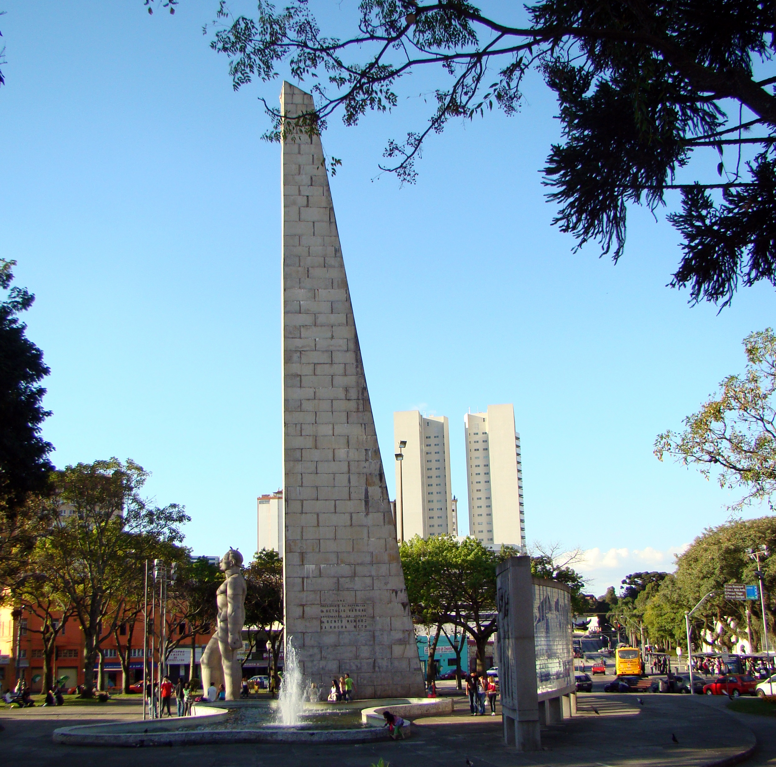 Praça Dezenove "Homem Nu"